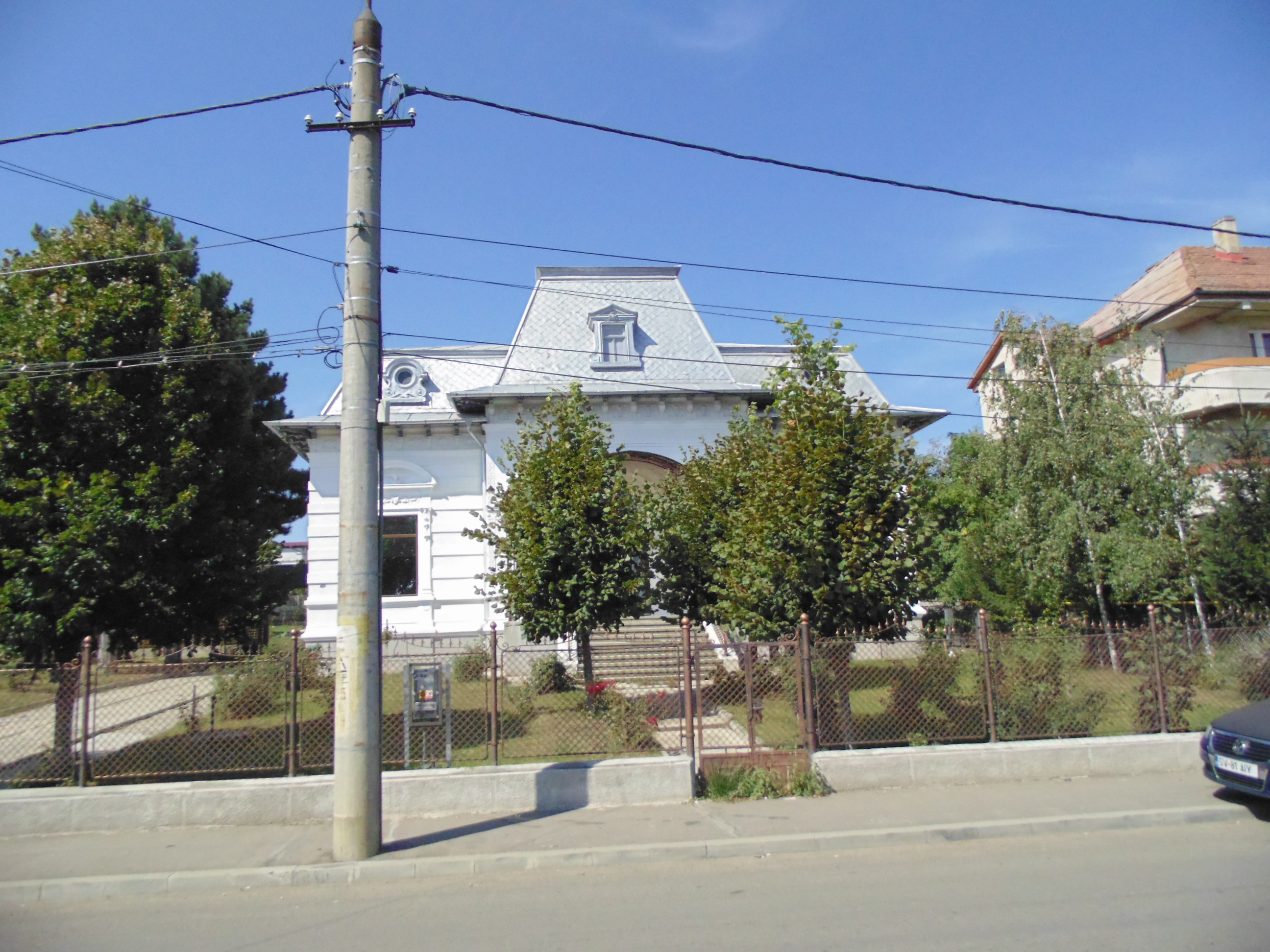 Suceava, Str. Mihai Eminescu, nr. 16.